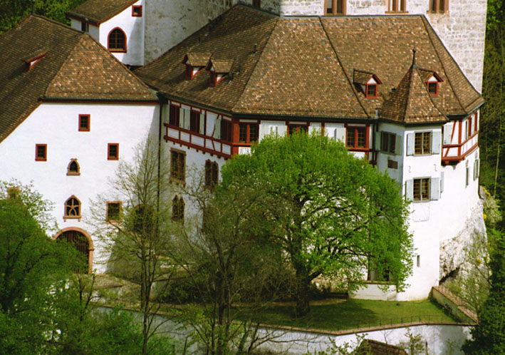 Schloss Angenstein, neuerer Wohnteil